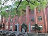 中文（台灣）: 國立中壢高級中學圖書館。